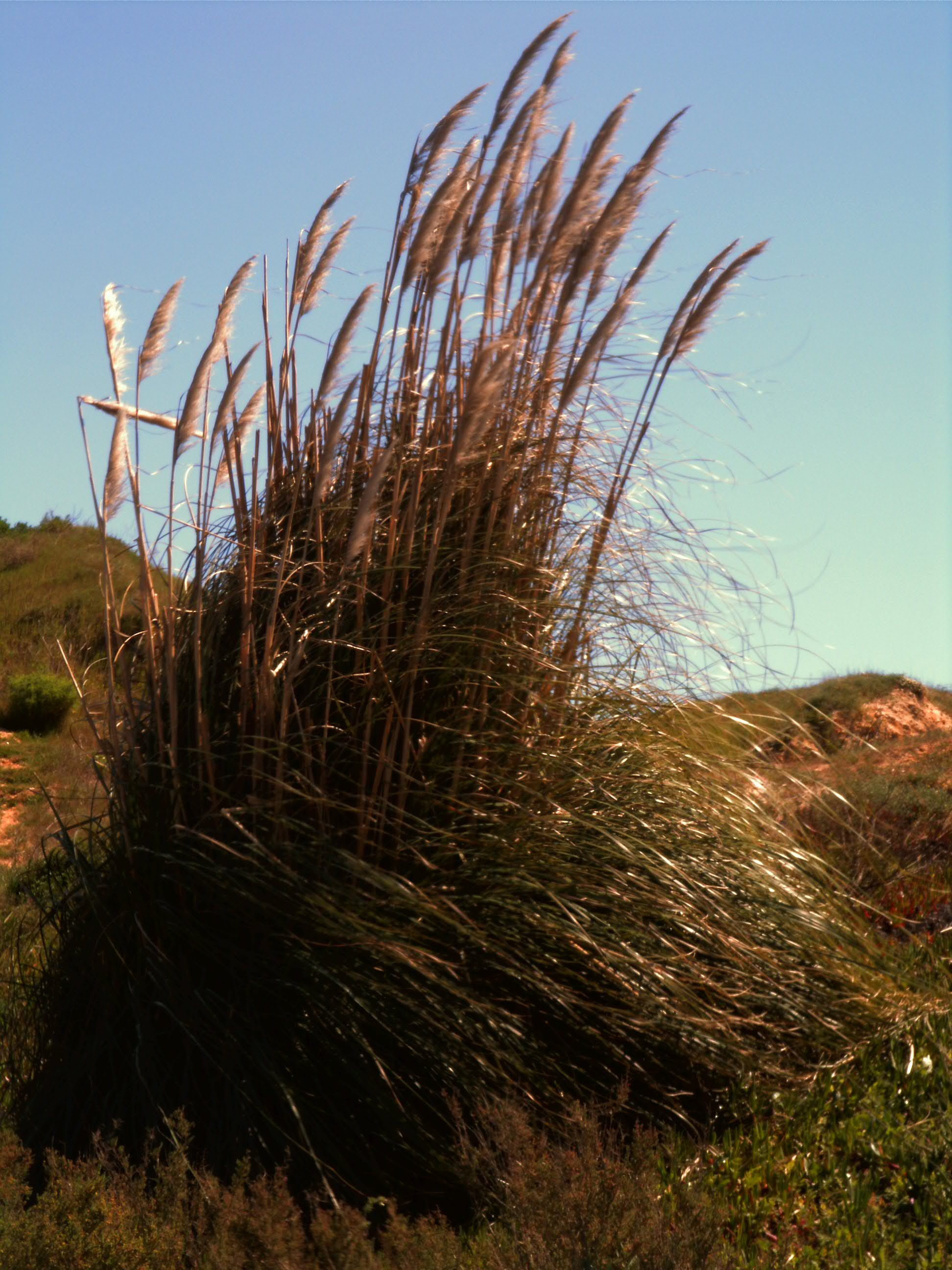 Name Arundo donax Cortaderia selloana Familiy Poaceae